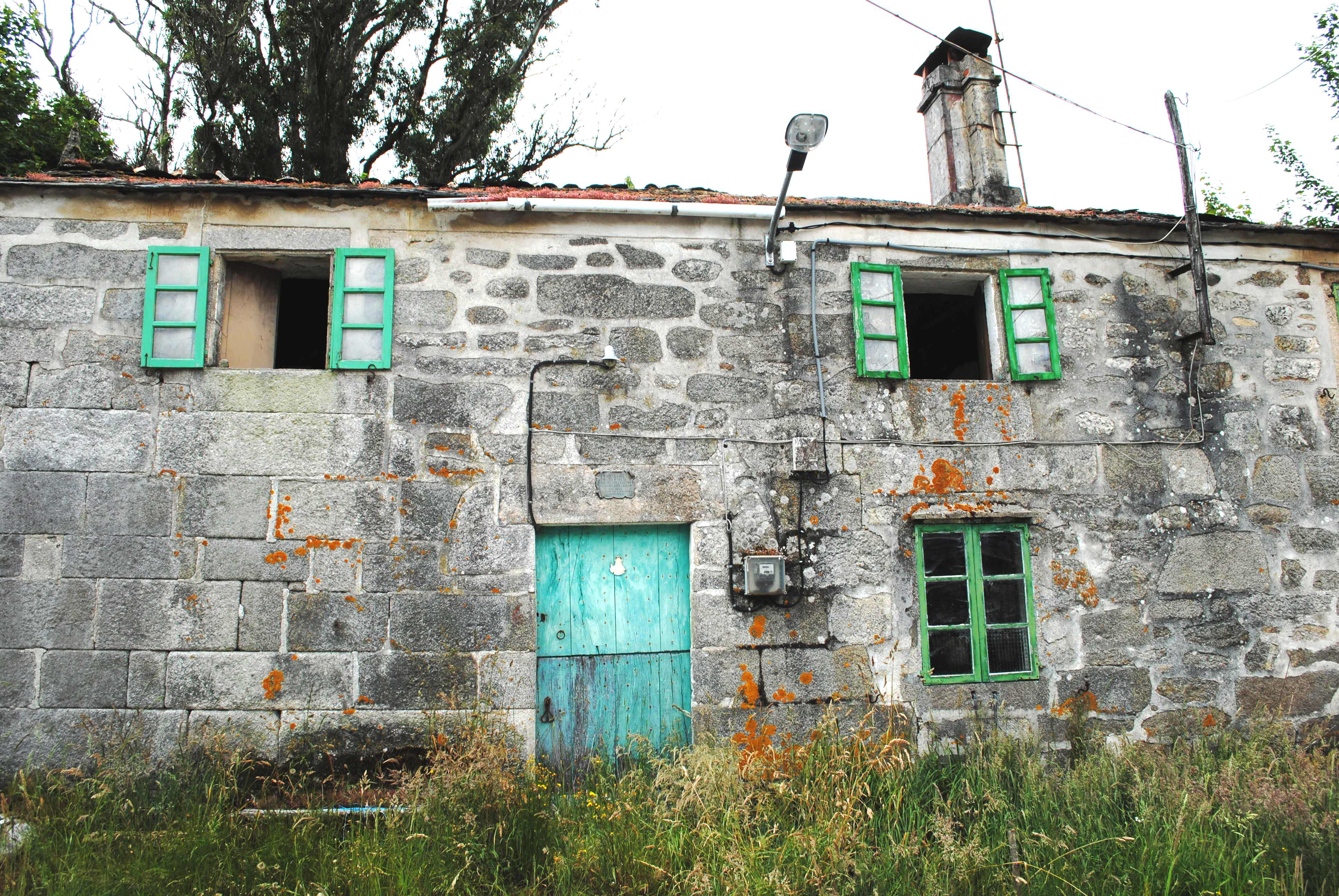 Casa natal de Xosé María Díaz Castro no Vilariño (Guitiriz).